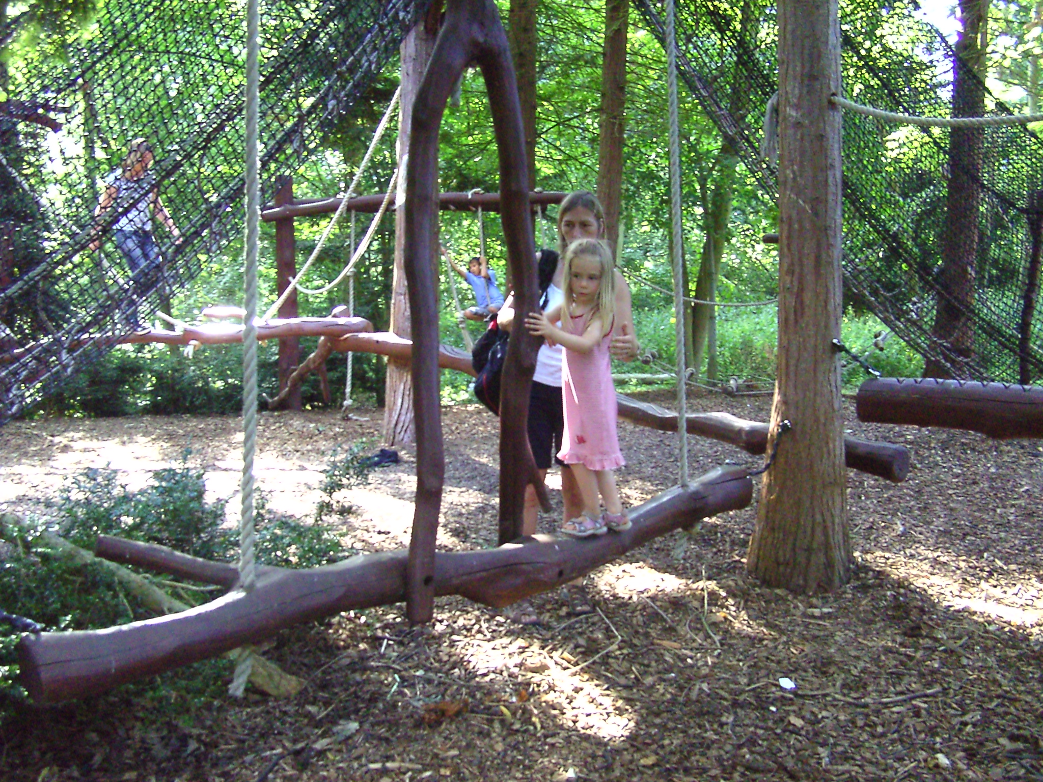 Größter Abenteuerspielplatz Dänemarks im "Knuthenborg Park & Safari", Klettergarten mit Entdeckungsreise "wilder" Tiere im dichten Dschungel